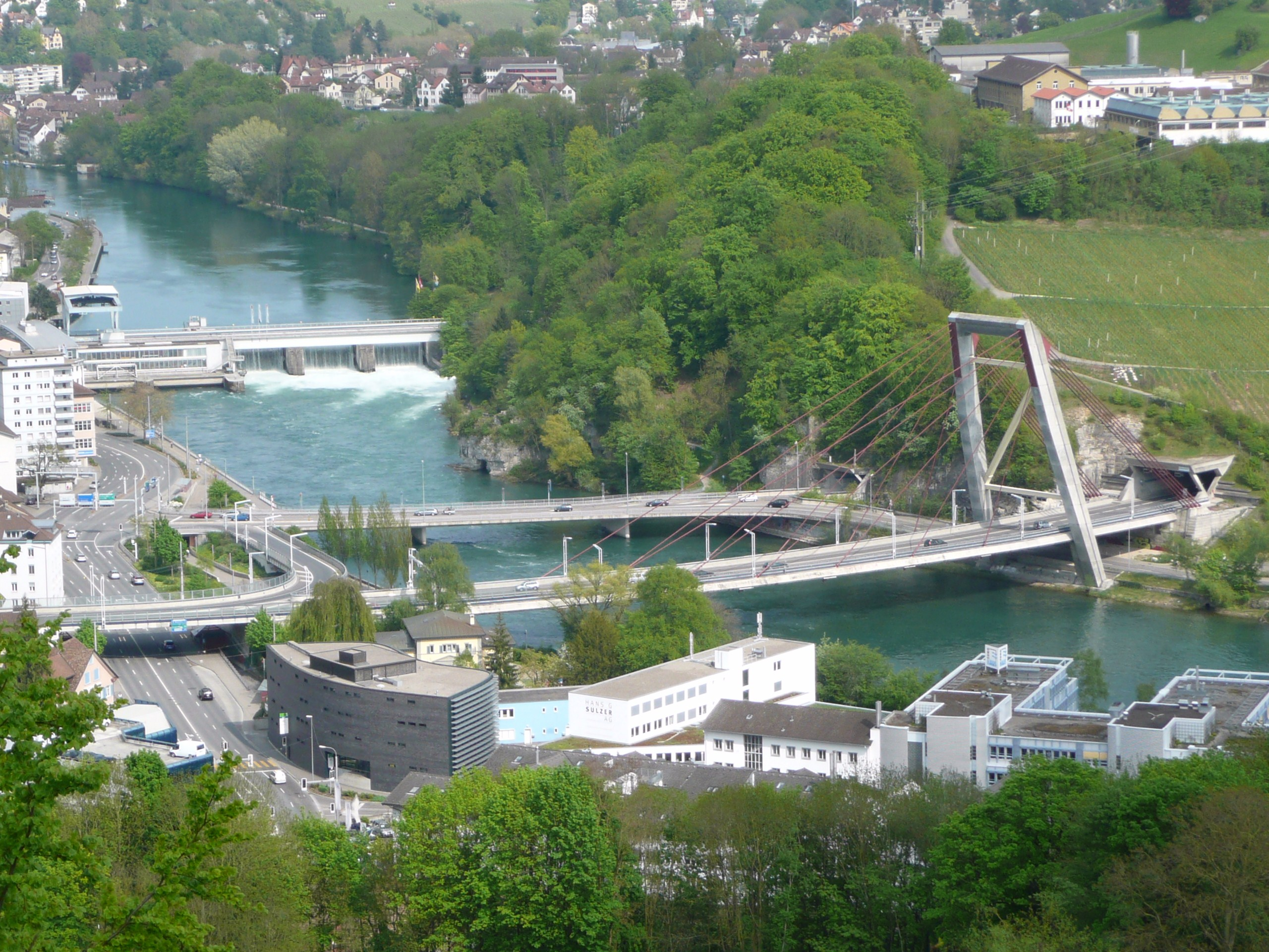 Blick von der Hohfluh auf den Rhein bei Schaffhausen mit dem Kraftwerk, der Brücke Schaffhausen-Flurlingen und der Schrägseilbrücke A4.